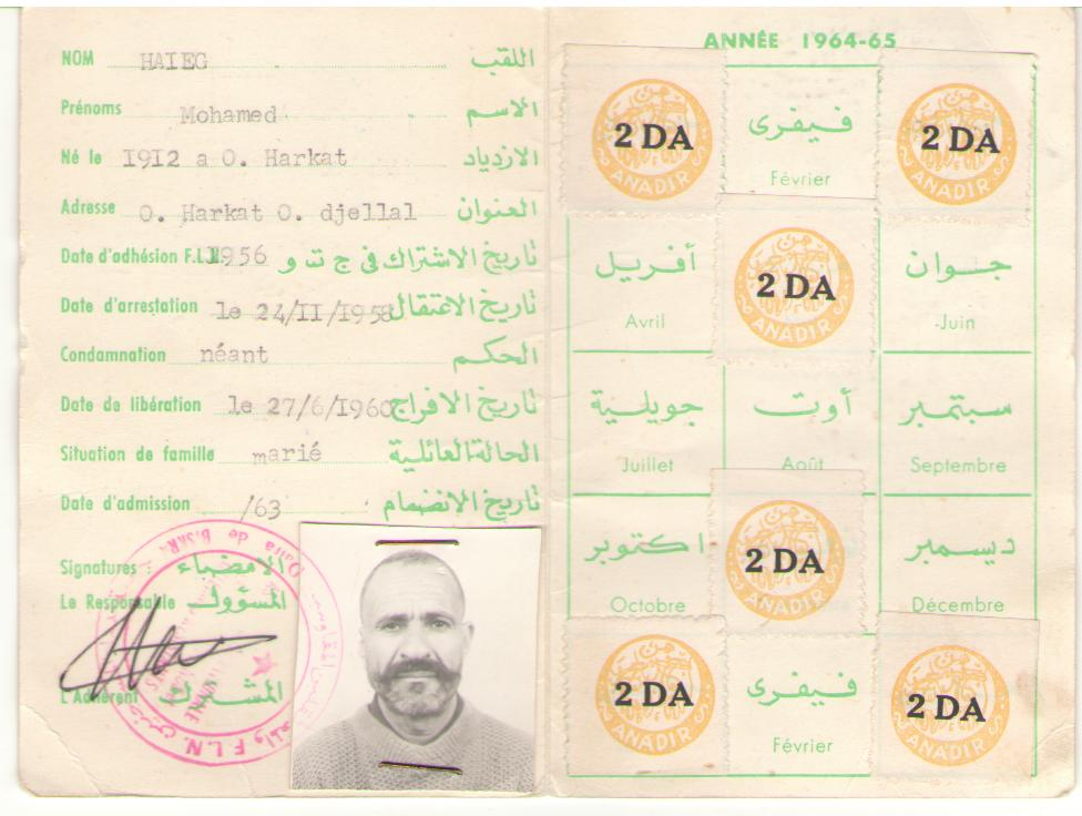 بطاقة محمد هياق لإثبات إنتسابه لمجاهدي الثورة